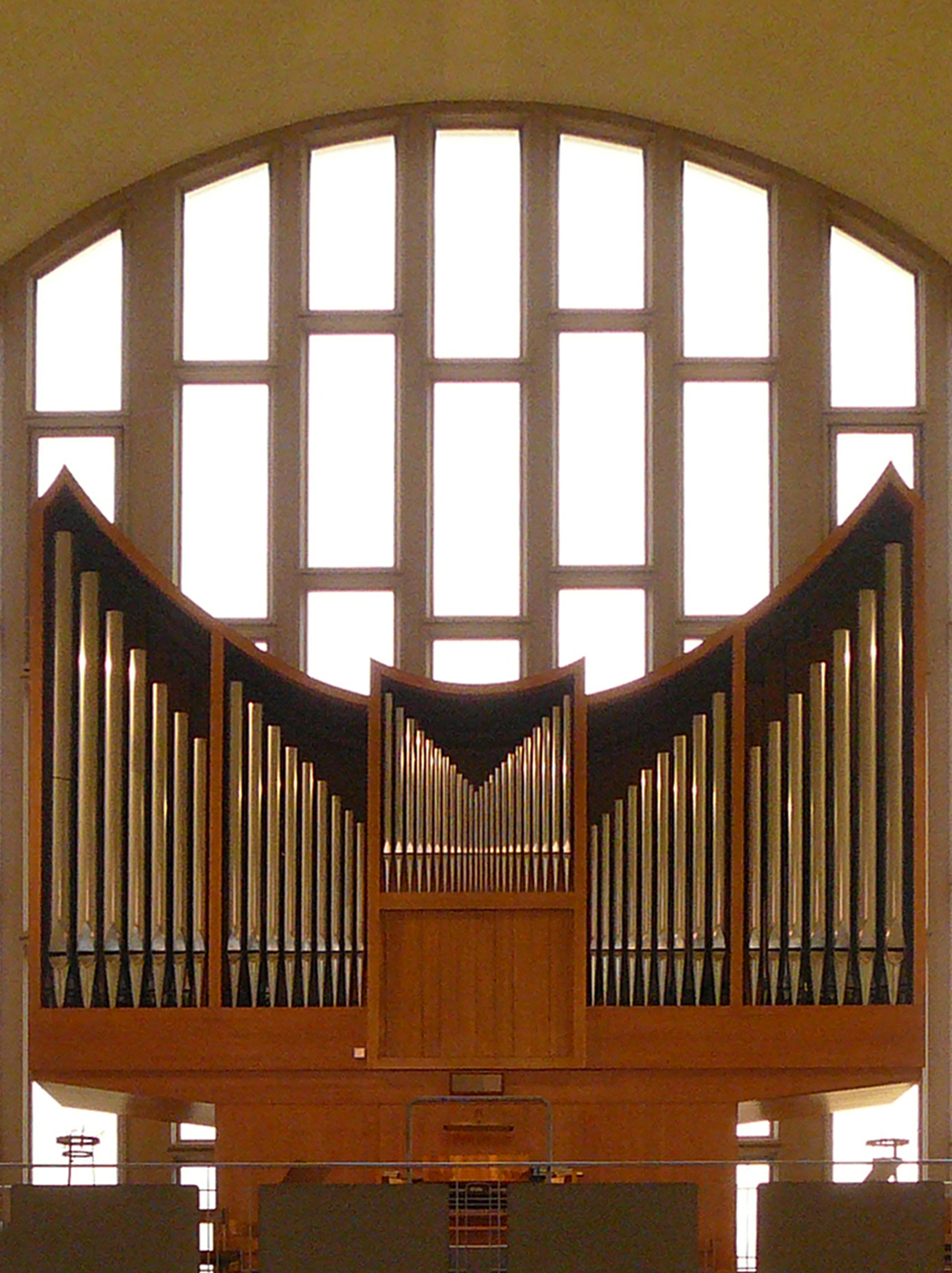 Römisch-katholische Pfarrkirche St. Gallus Zürich-Schwamendingen, Orgel mit Fenster